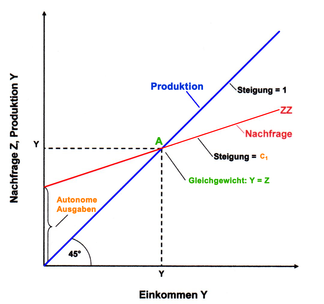 Das Gütermarktgleichgewicht